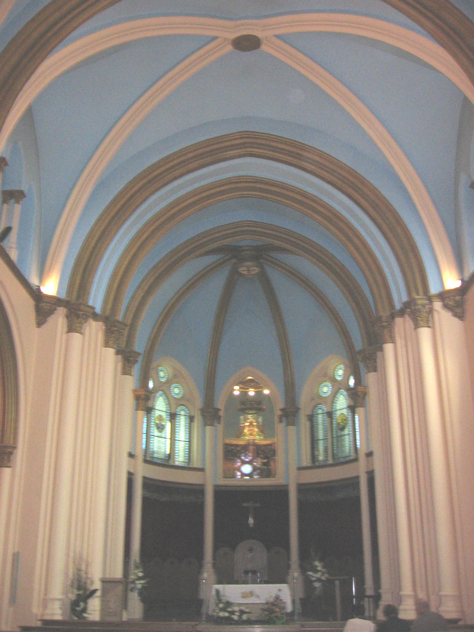 Interior del Santuario de Nuria